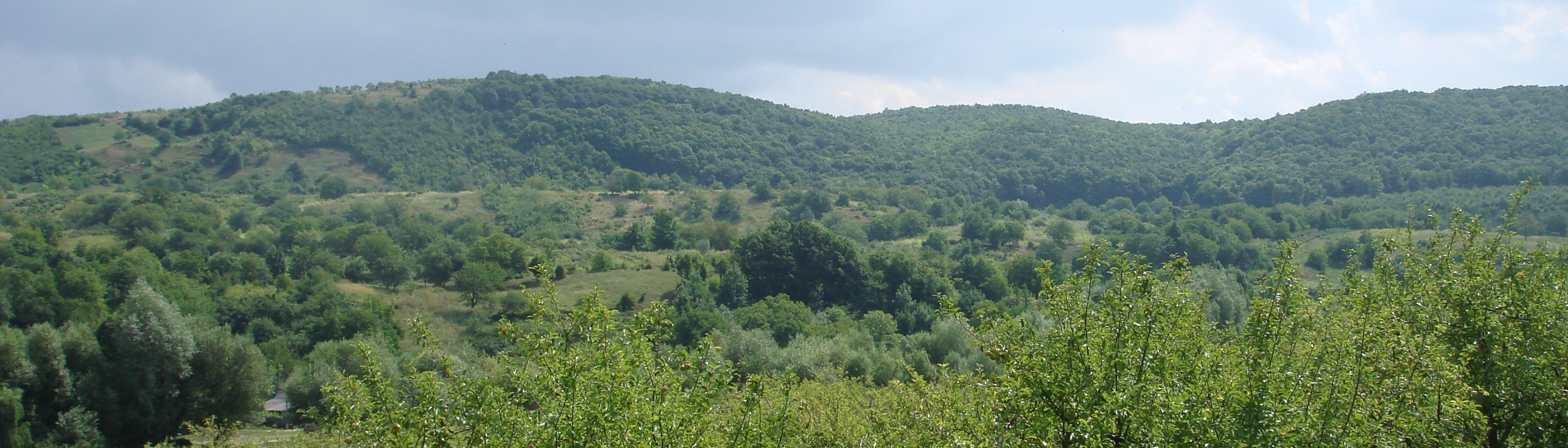 Пейзаж возле села Долна Страшенского района Молдавии